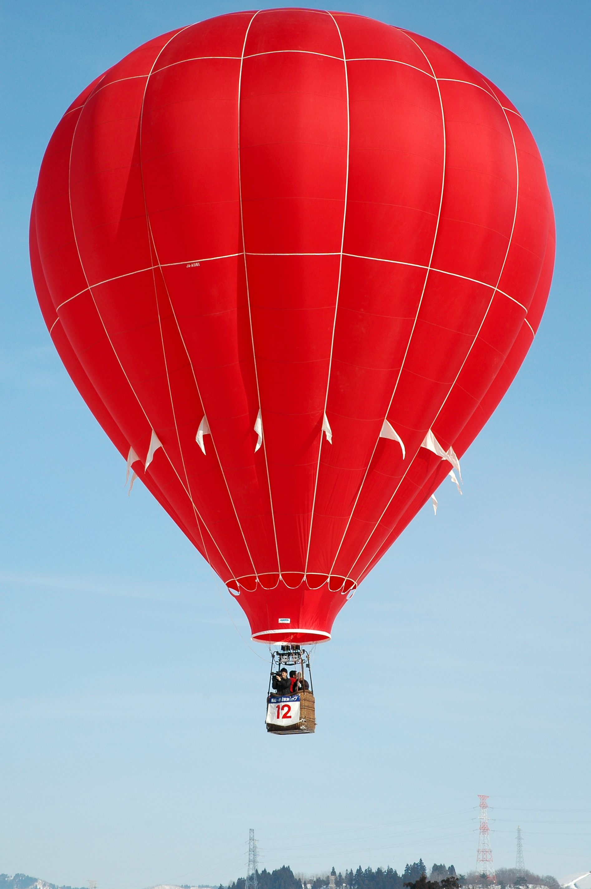 2006 Ojiya Balloon Festival (2006年おぢや風船一揆)